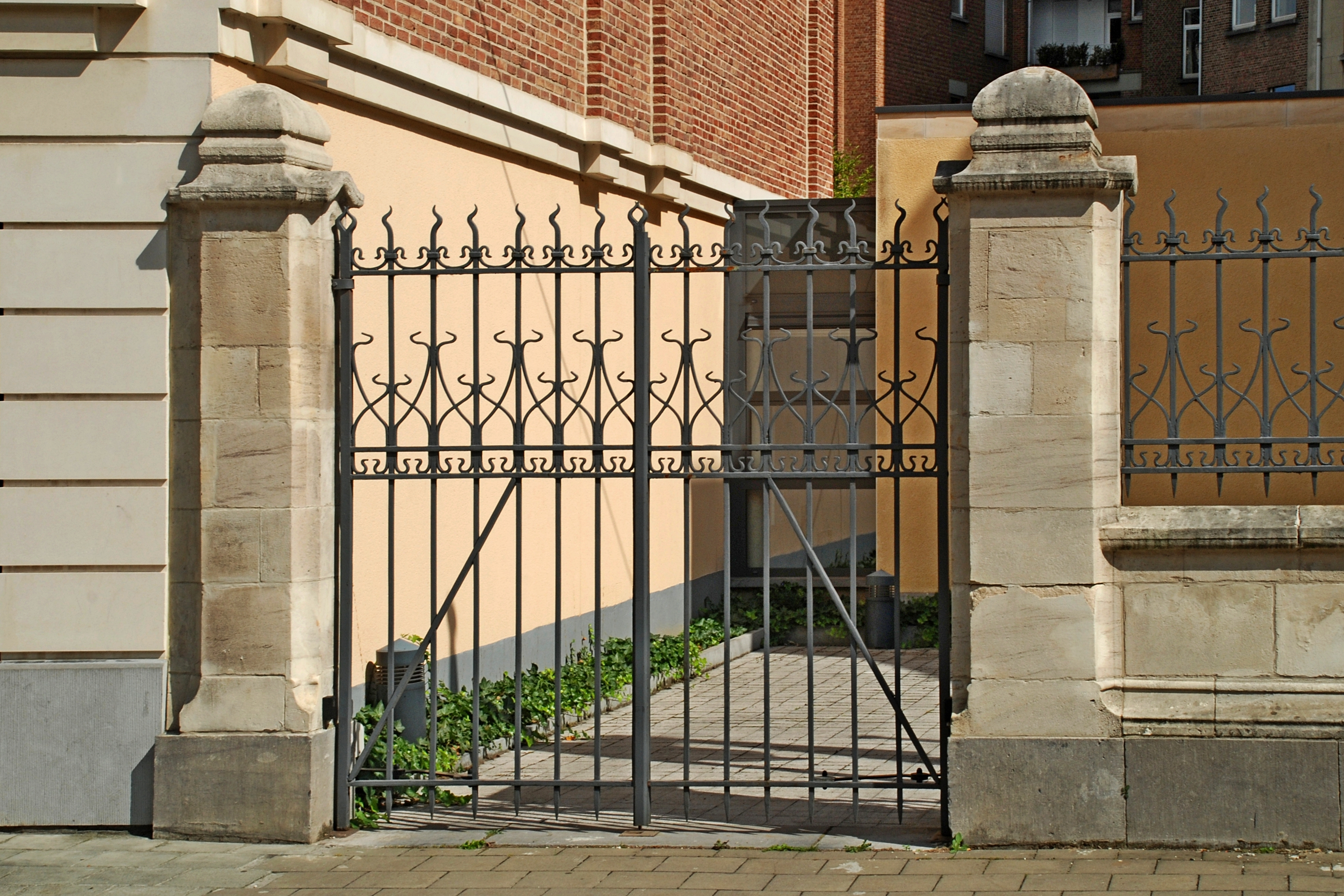 Belgique - Bruxelles - Hôtel De Brouckère